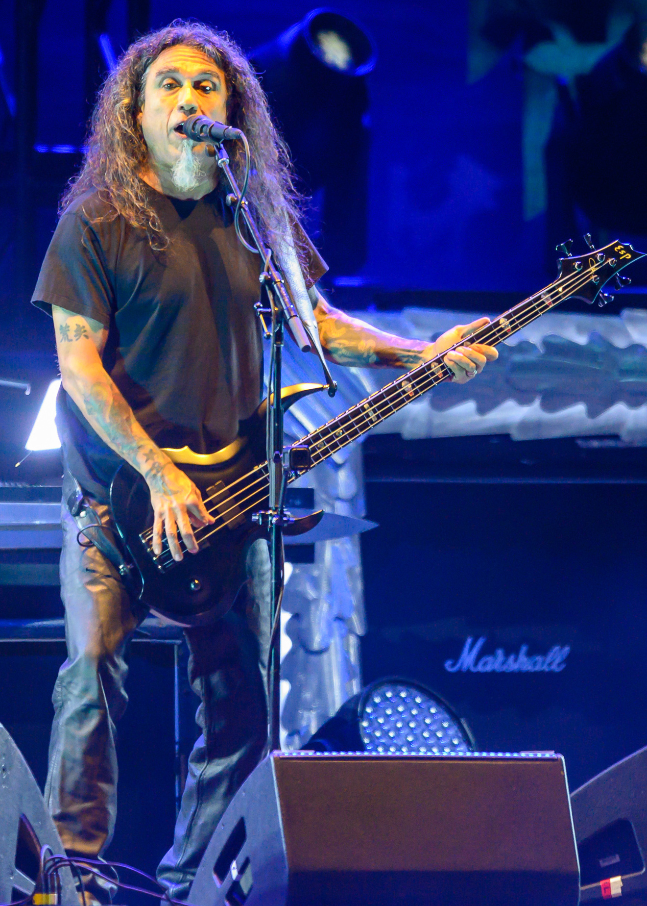 ARGO-Konzerte,Beck's Park Stage,Konzert,Livekonzert,Livemusik,Musik,RiP,Rock im Park 2019,Slayer,Tom Araya